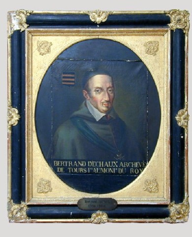 Portrait de Bertrand d'Echaux (1557-1641), évêque de Bayonne, archevêque de Tours, premier aumônier d'Henri IV et de Louis XIII